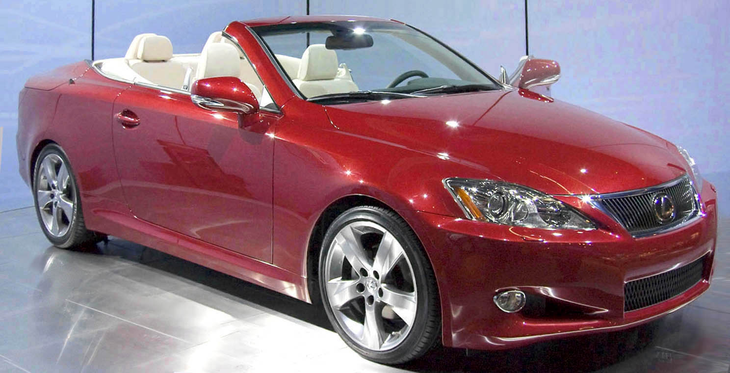 Lexus IS 250C